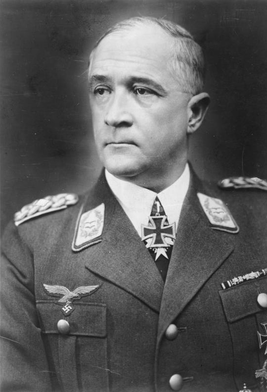 Robert Ritter v. Greim Aufnahme vom Januar 1939 - Herausgabe: 19.6.1940; Ritterkreuz nachträglich einmontiert Abgebildete Personen: Greim, Robert von Ritter: Feldmarschall (hier: als Generalleutnant), Ritterkreuz (RK), Luftwaffe, Deutschland (GND 116830670)